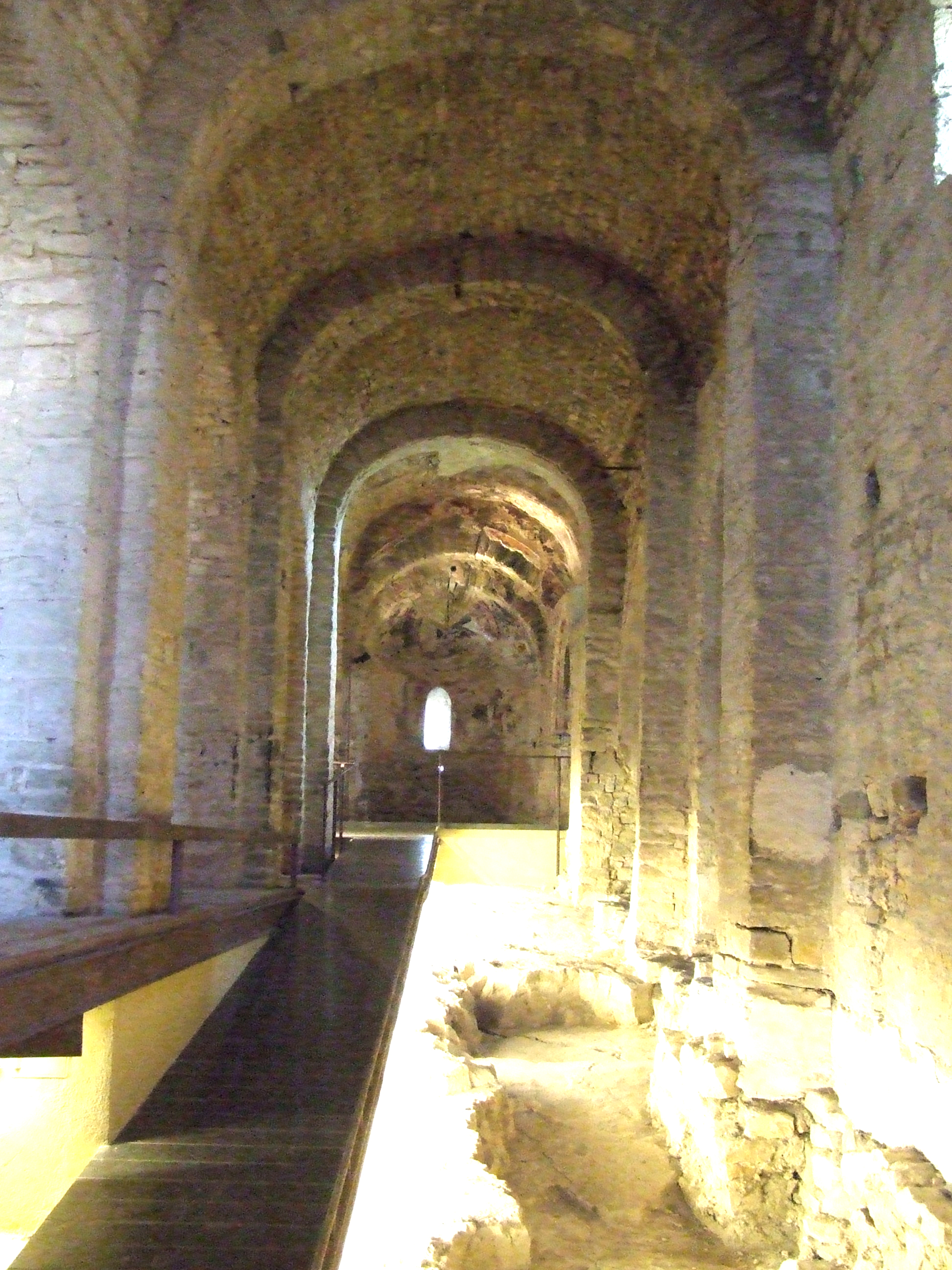 Nau col·lateral sud de Santa Maria de Mur (Mur, Castell de Mur, Pallars Jussà)